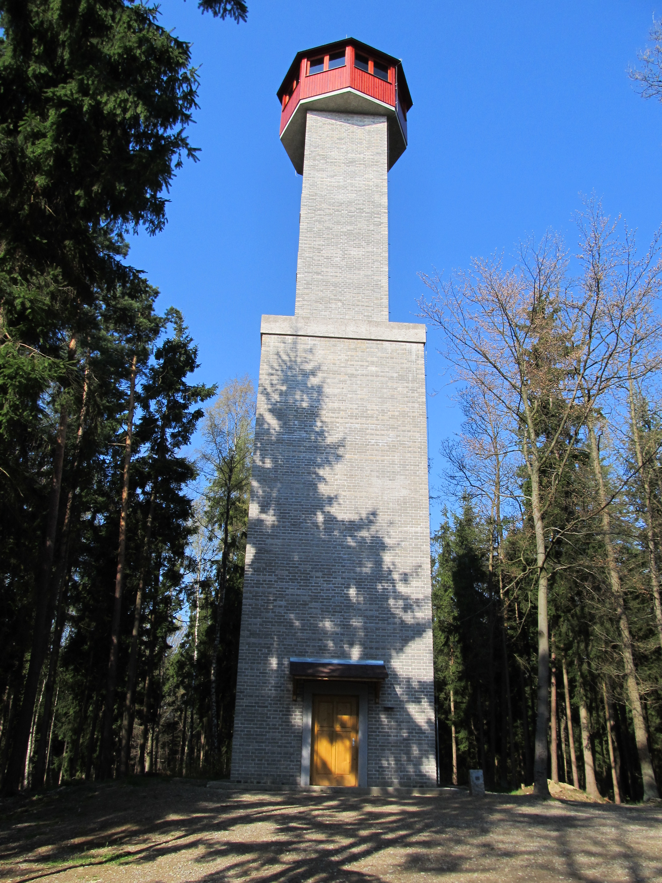 Chanovická rozhledna